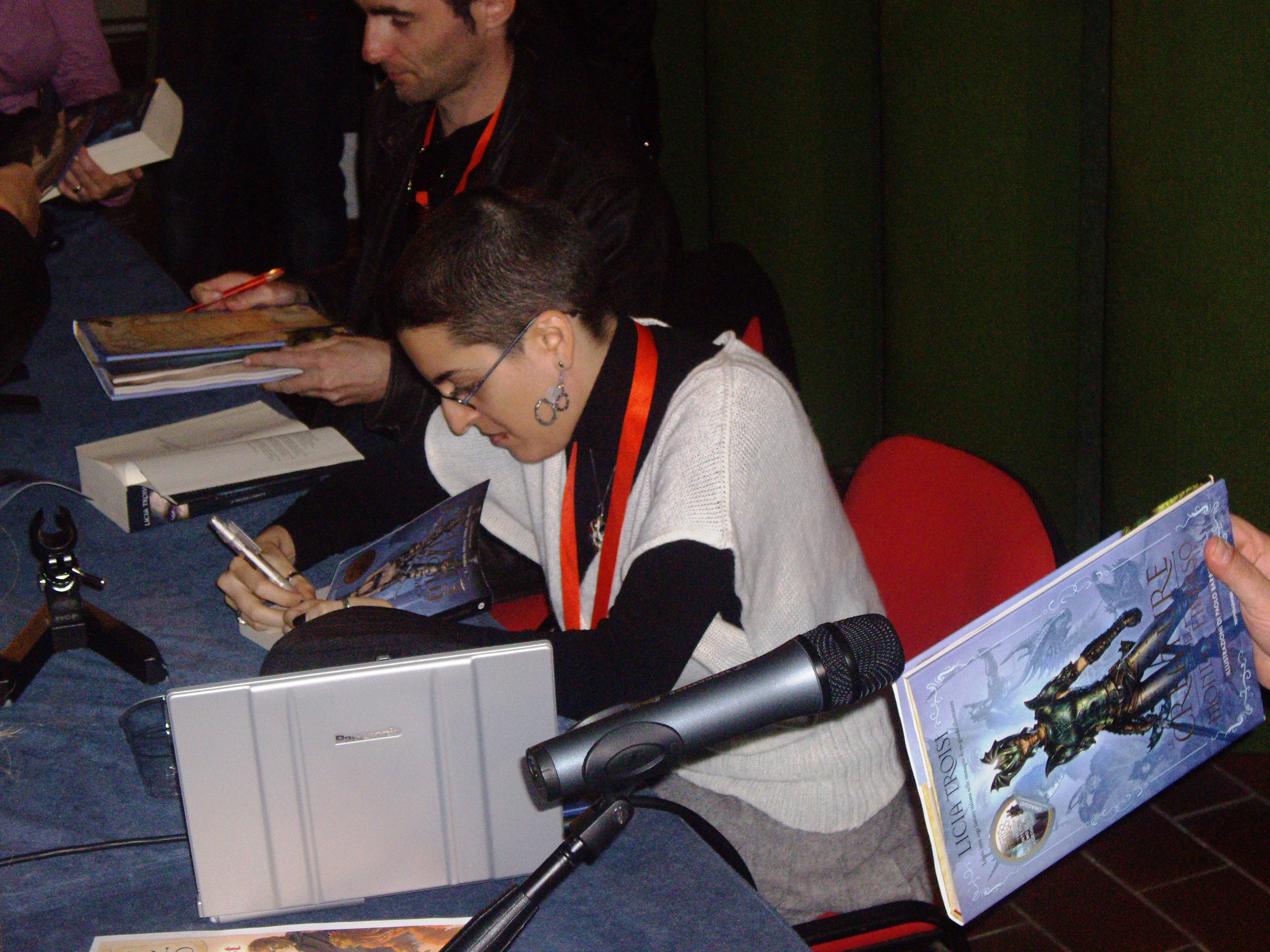 Licia Troisi e Paolo Barbieri alla fiera "Lucca Comics & Games 08", sabato 1 novembre 2008 Cinema Centrale, Piazza Cittadella, Lucca